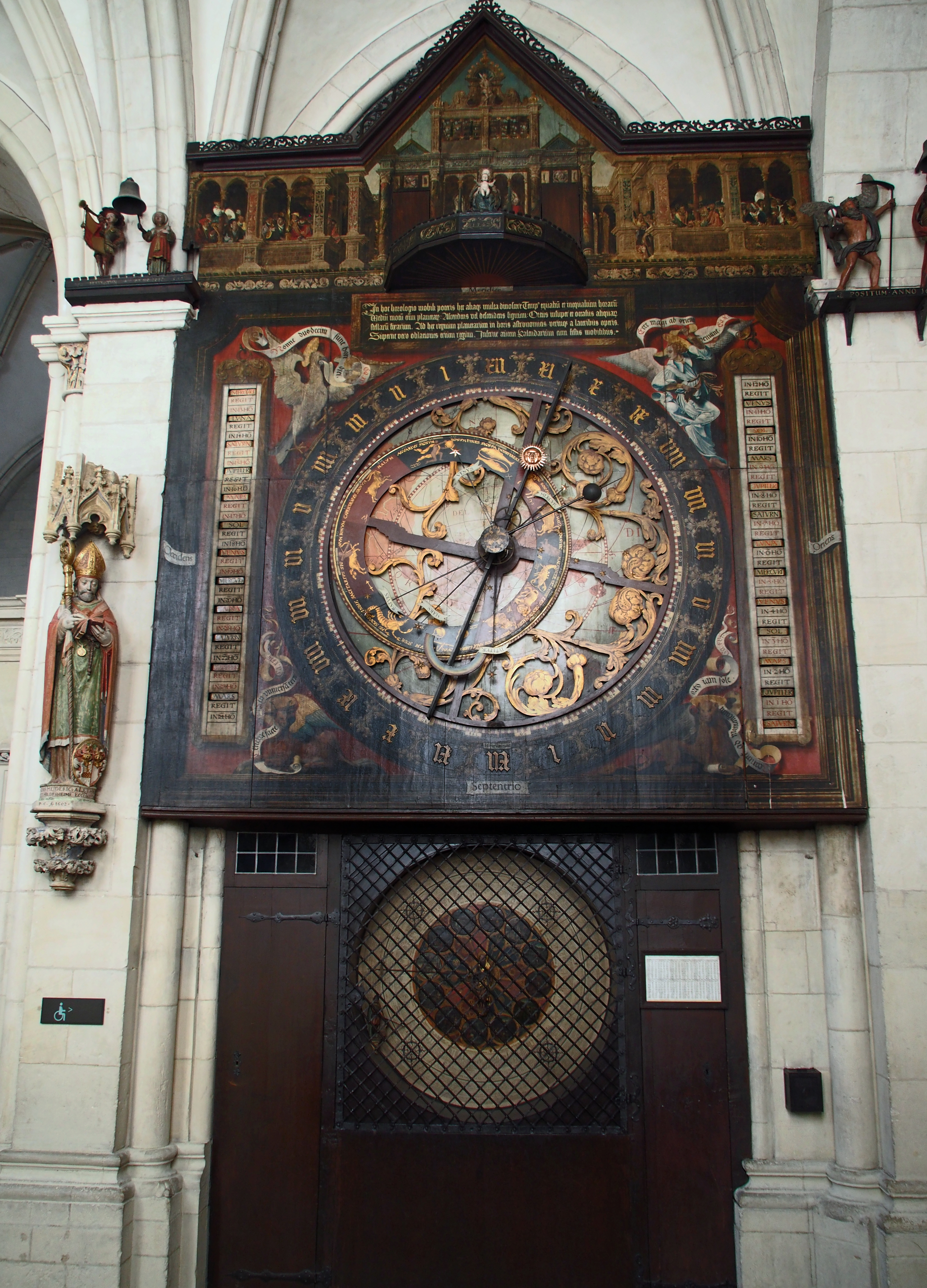 Astronomische Uhr mit Glockenspiel, Astrolabium (oben) und Kalendarium (unten) im St.-Paulus-Dom, Münster (Westfalen)